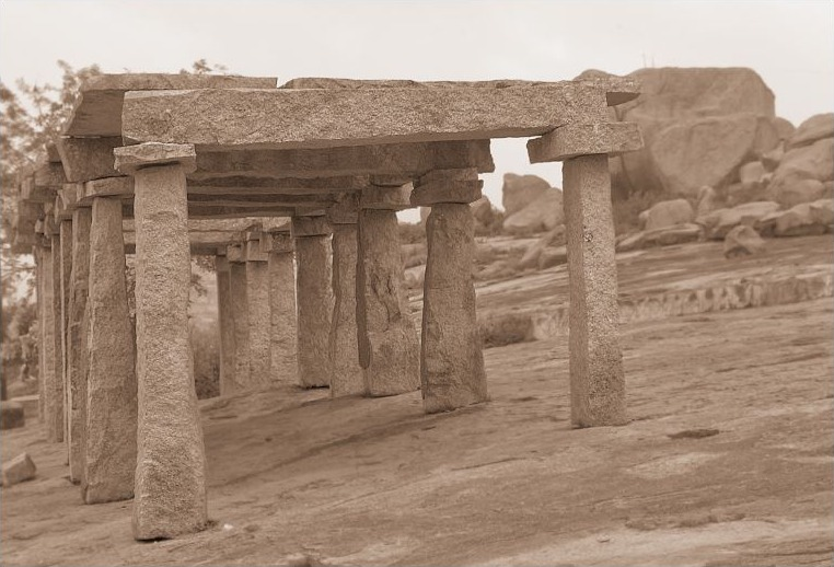 Pillars at Chikkajala Temple...